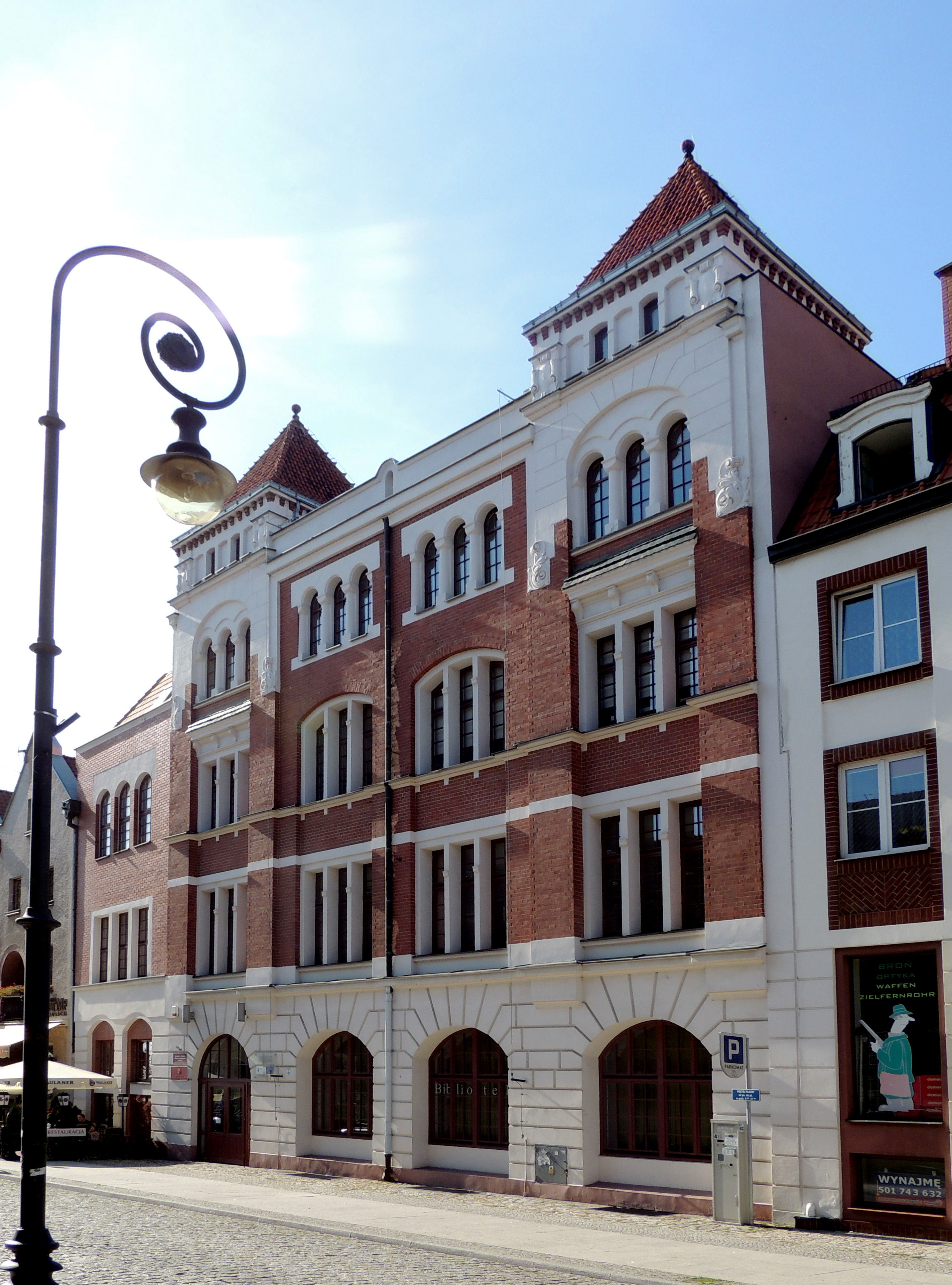 Elbląg, dom, ok. 1910